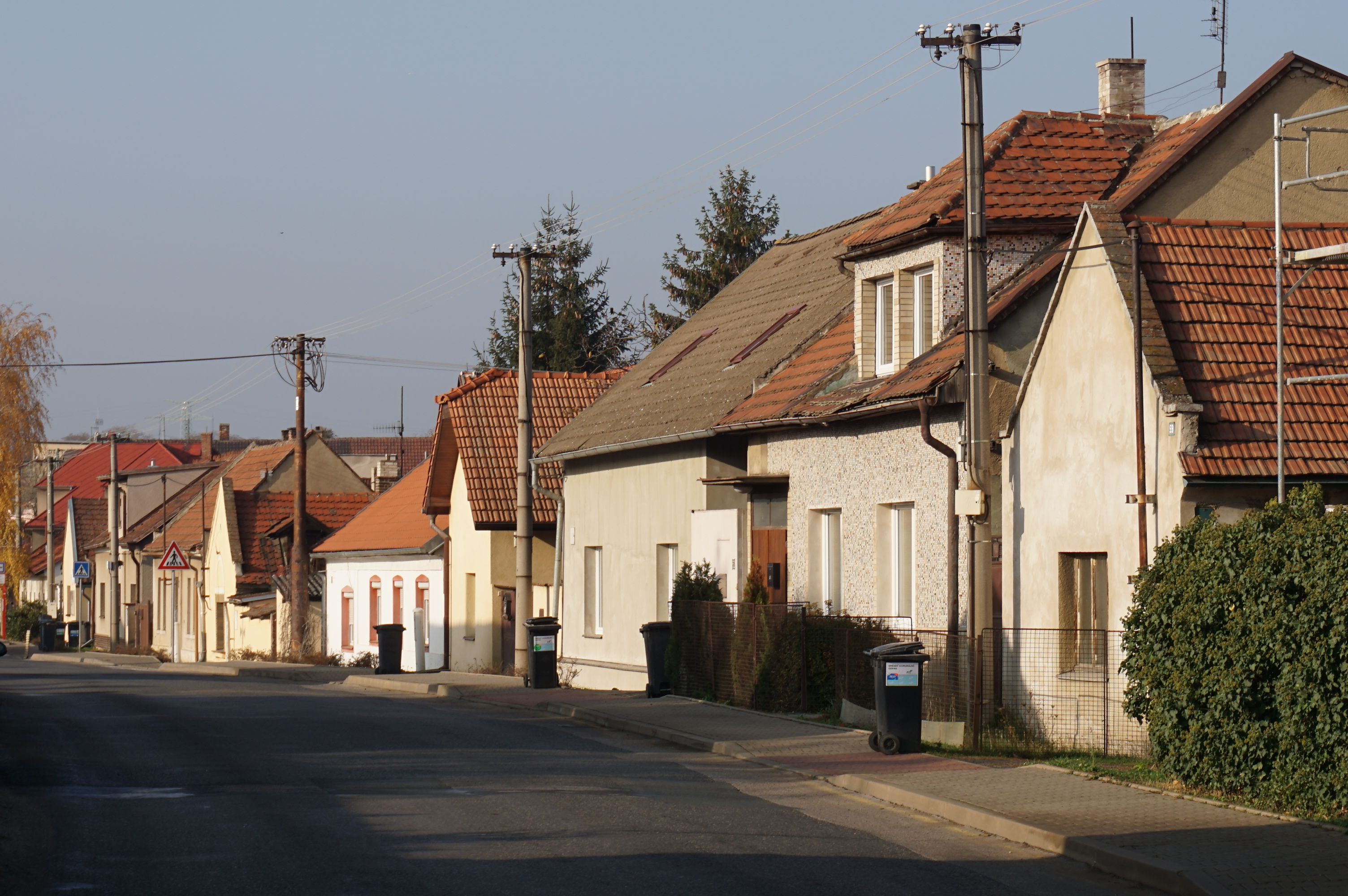 Předboj - severní strana ulice Hlavní směrem od východu k návsi